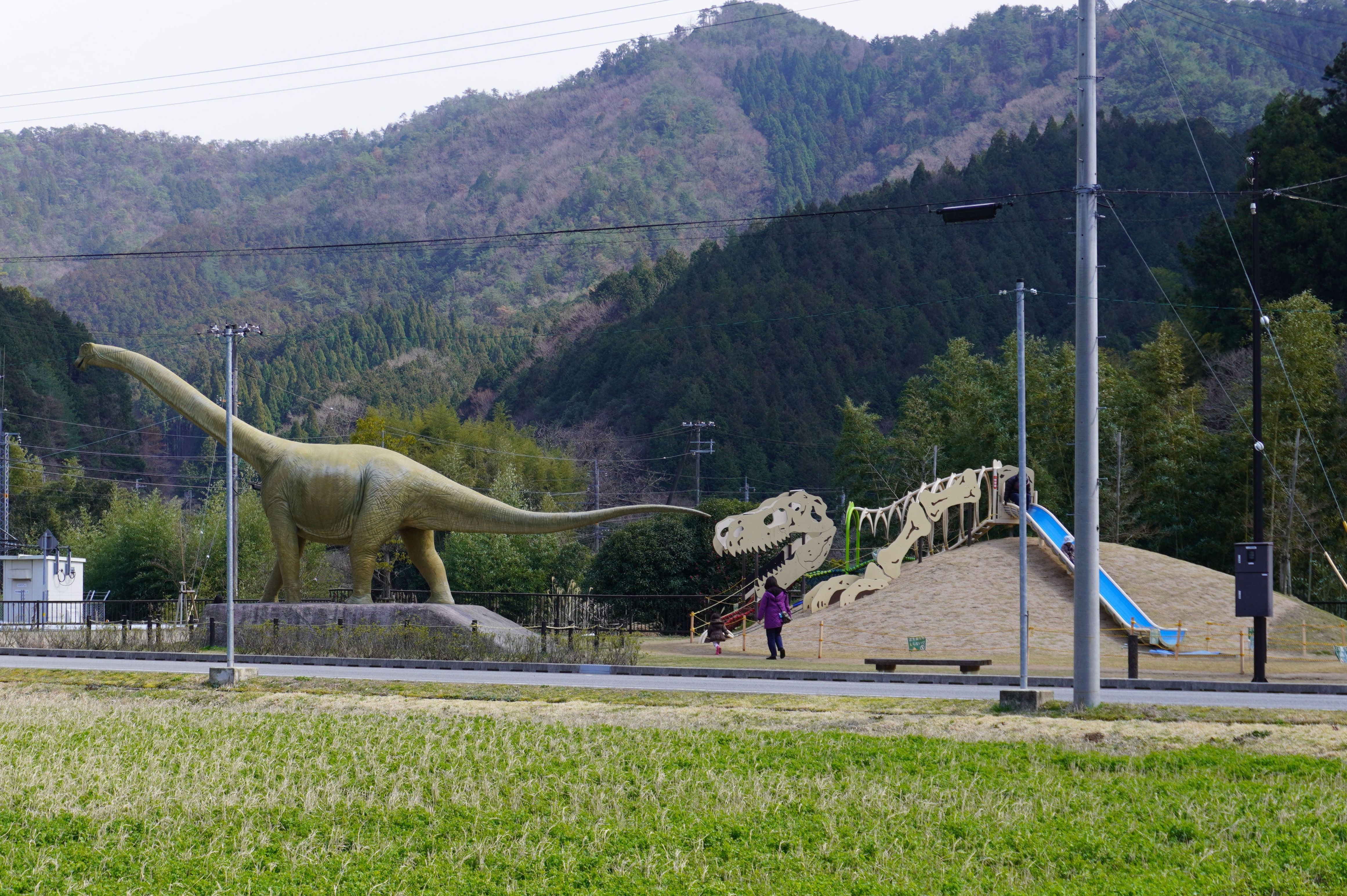 丹波竜の里公園 全景